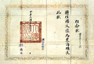 1926年杜锡珪给杨文恺的任命状，任命杨文恺为农商总长。